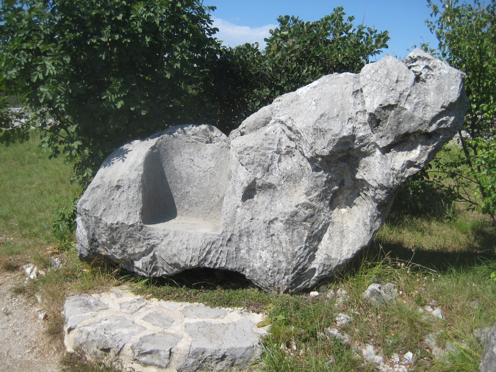 Borojevičev prestol pri Cerju na Krasu